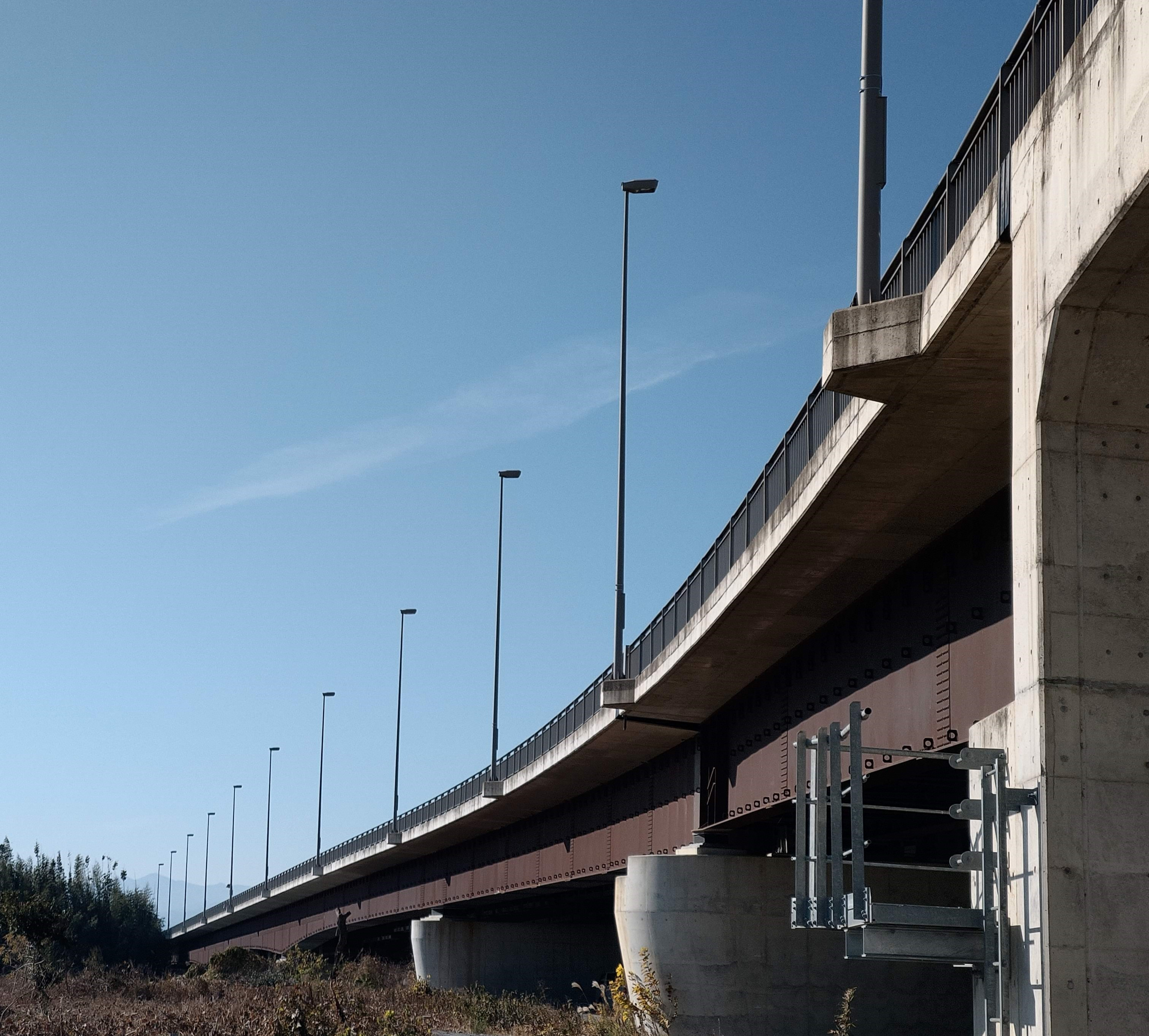 伊勢玉大橋(2019年12月 伊勢崎市側より撮影)